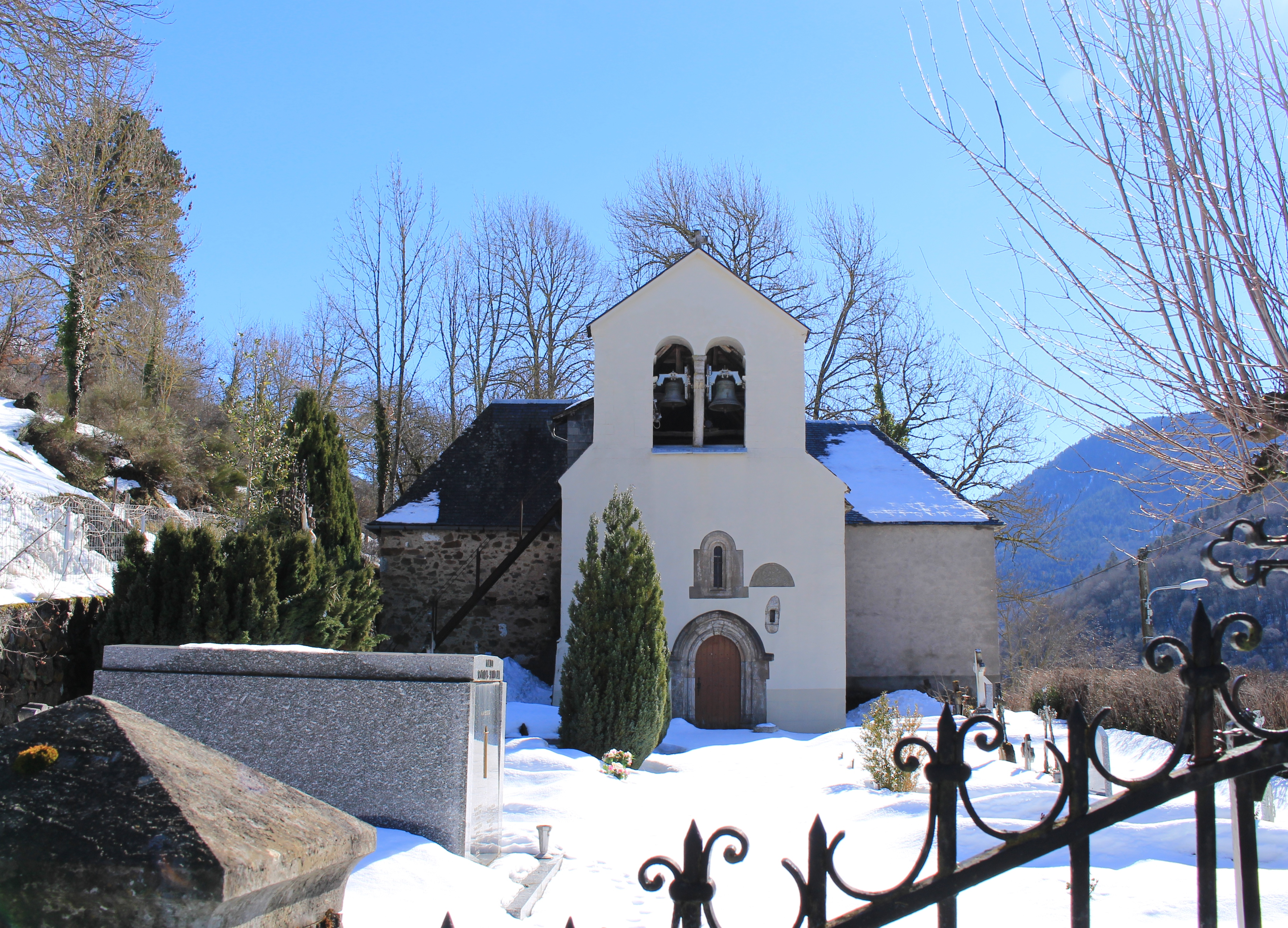 Église Saint-Saturnin de Cazaux-Debat (Hautes-Pyrénées)